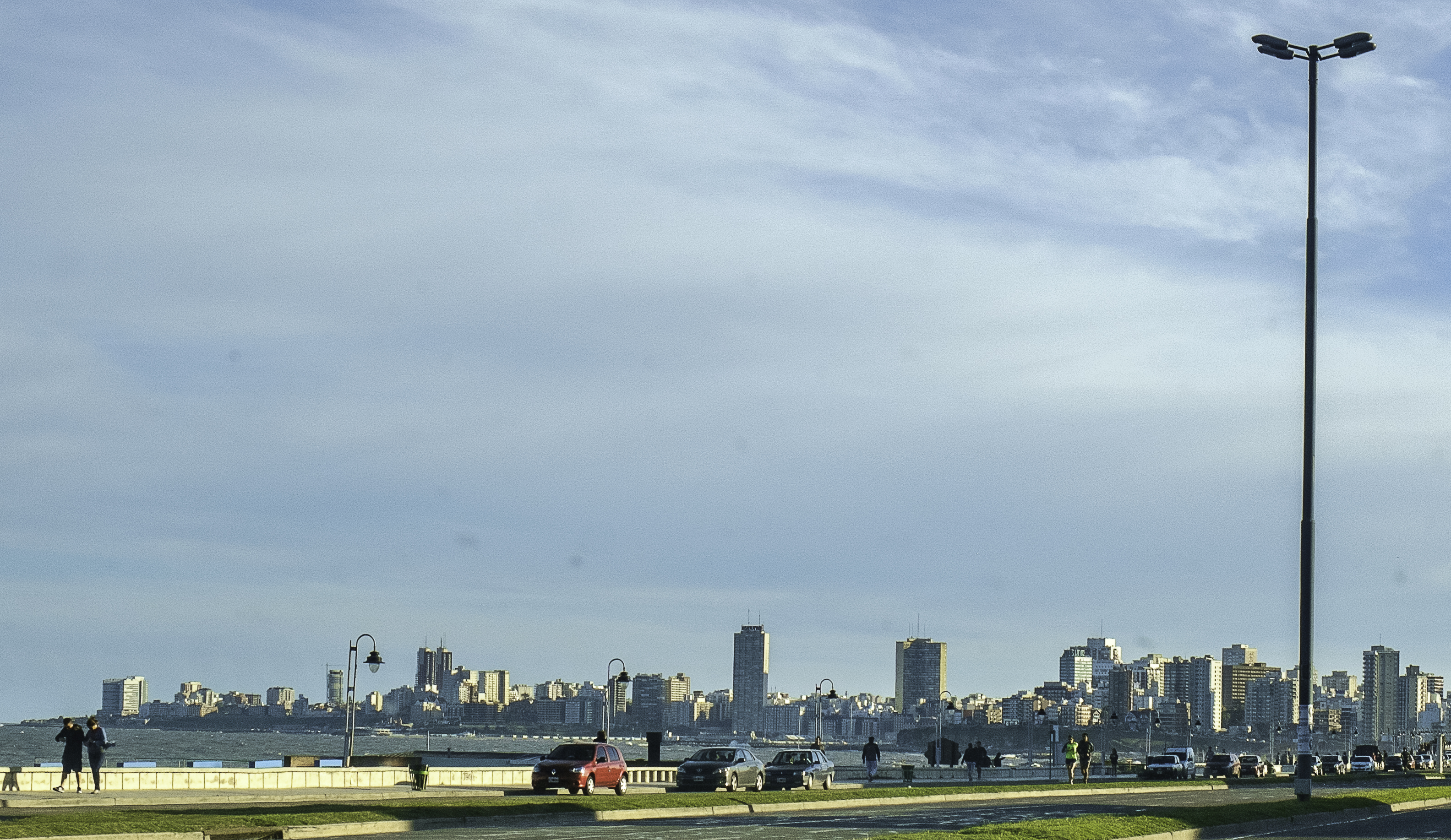 Stedelijk silhouet van Mar del Plata